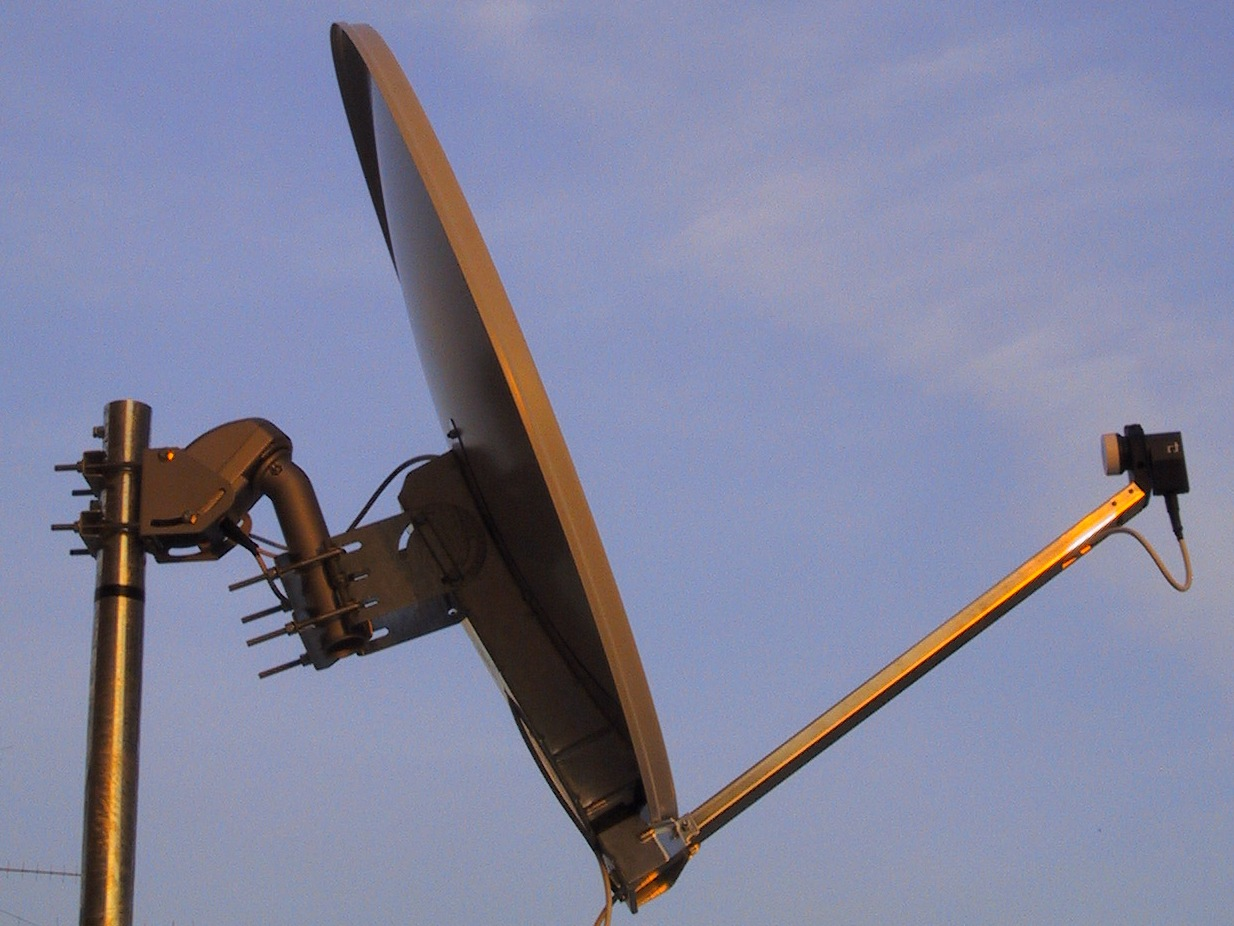 Parabola con motore Goto xx